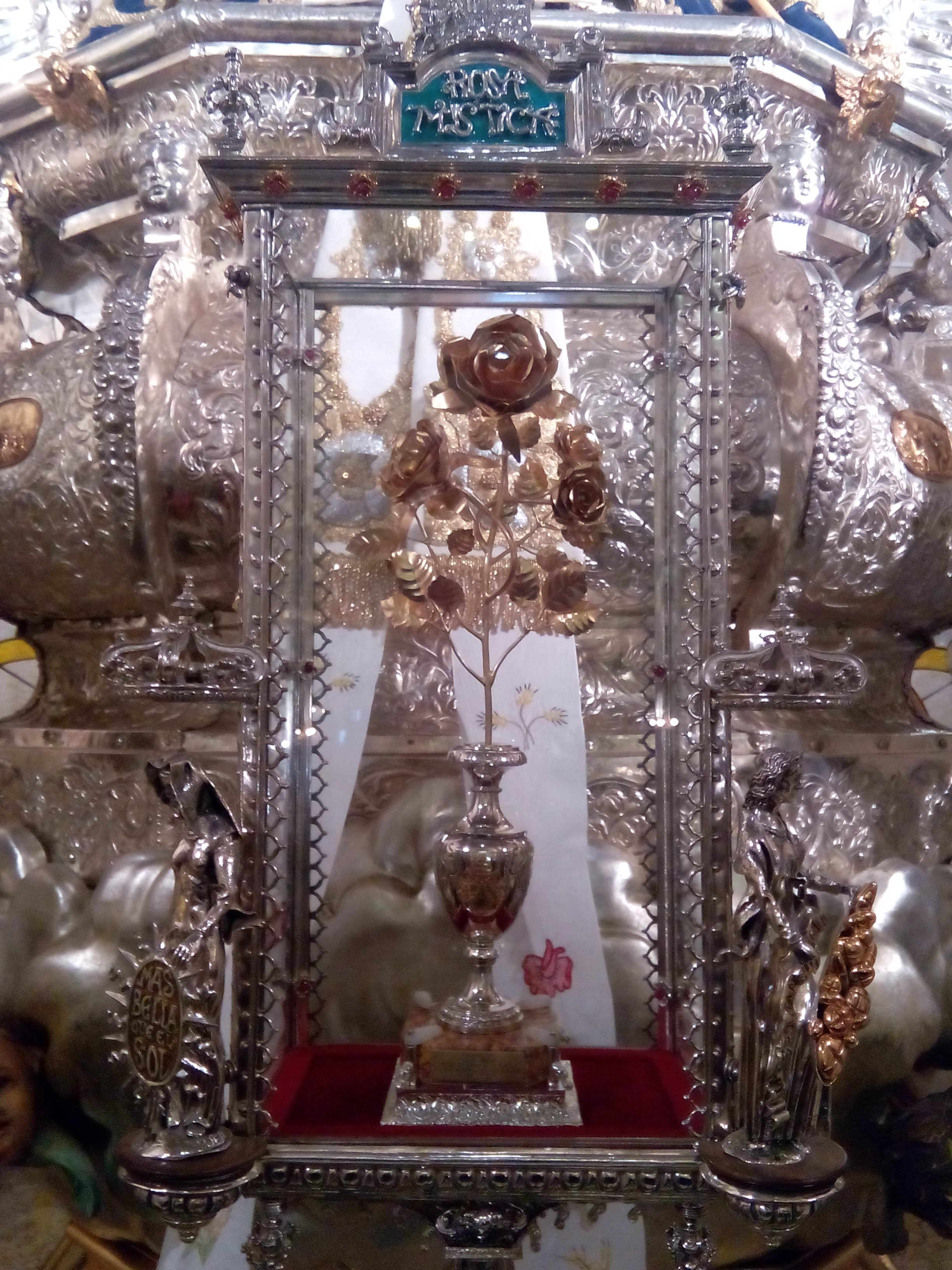 Rosa de Oro de la Virgen de la Cabeza en su Basílica.